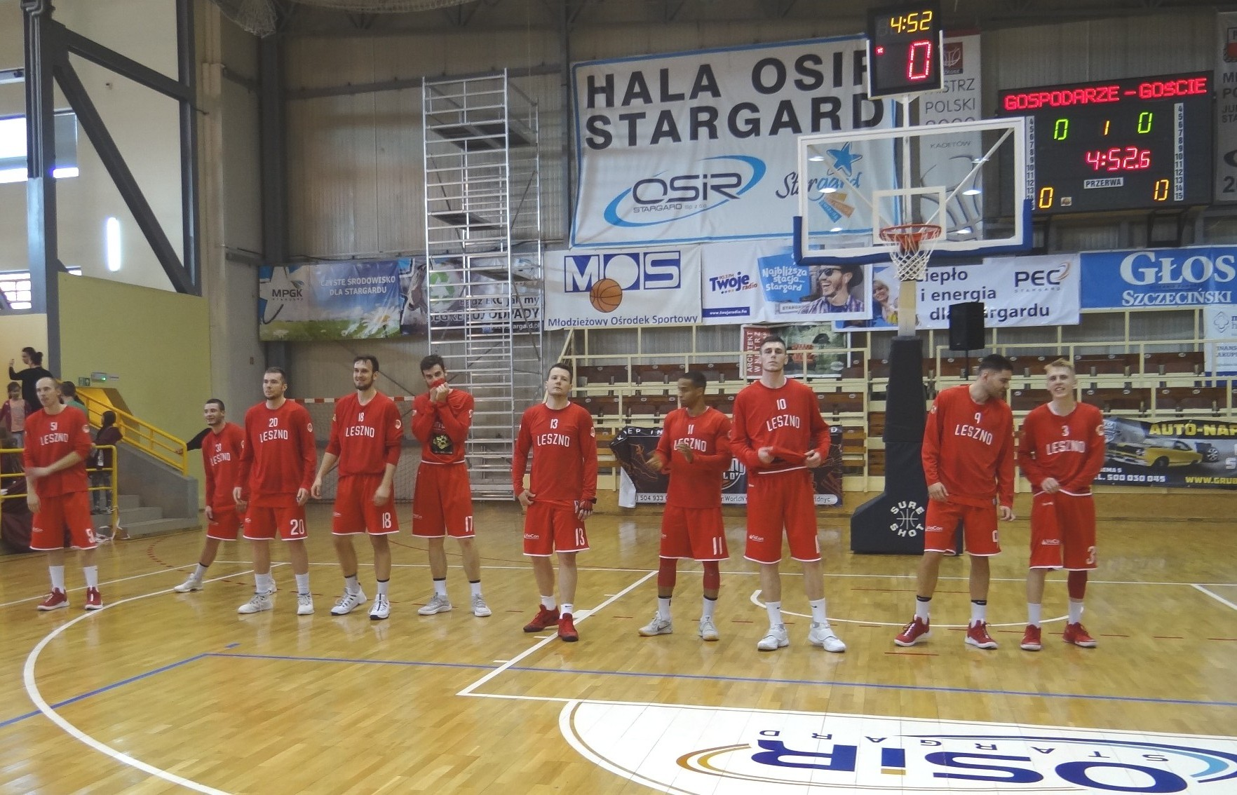 Jamalex Polonia Leszno